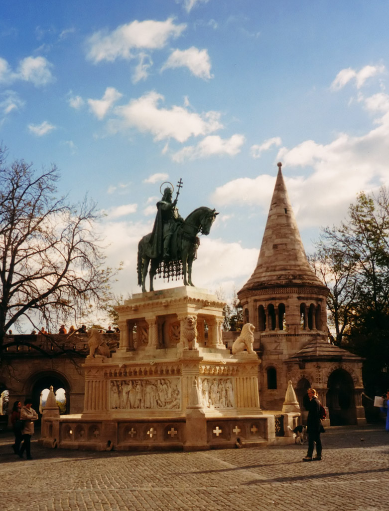 Denkmal König Stephans in Budapest